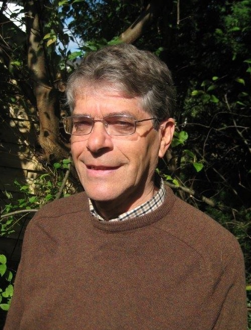 Frits Booy, publicist